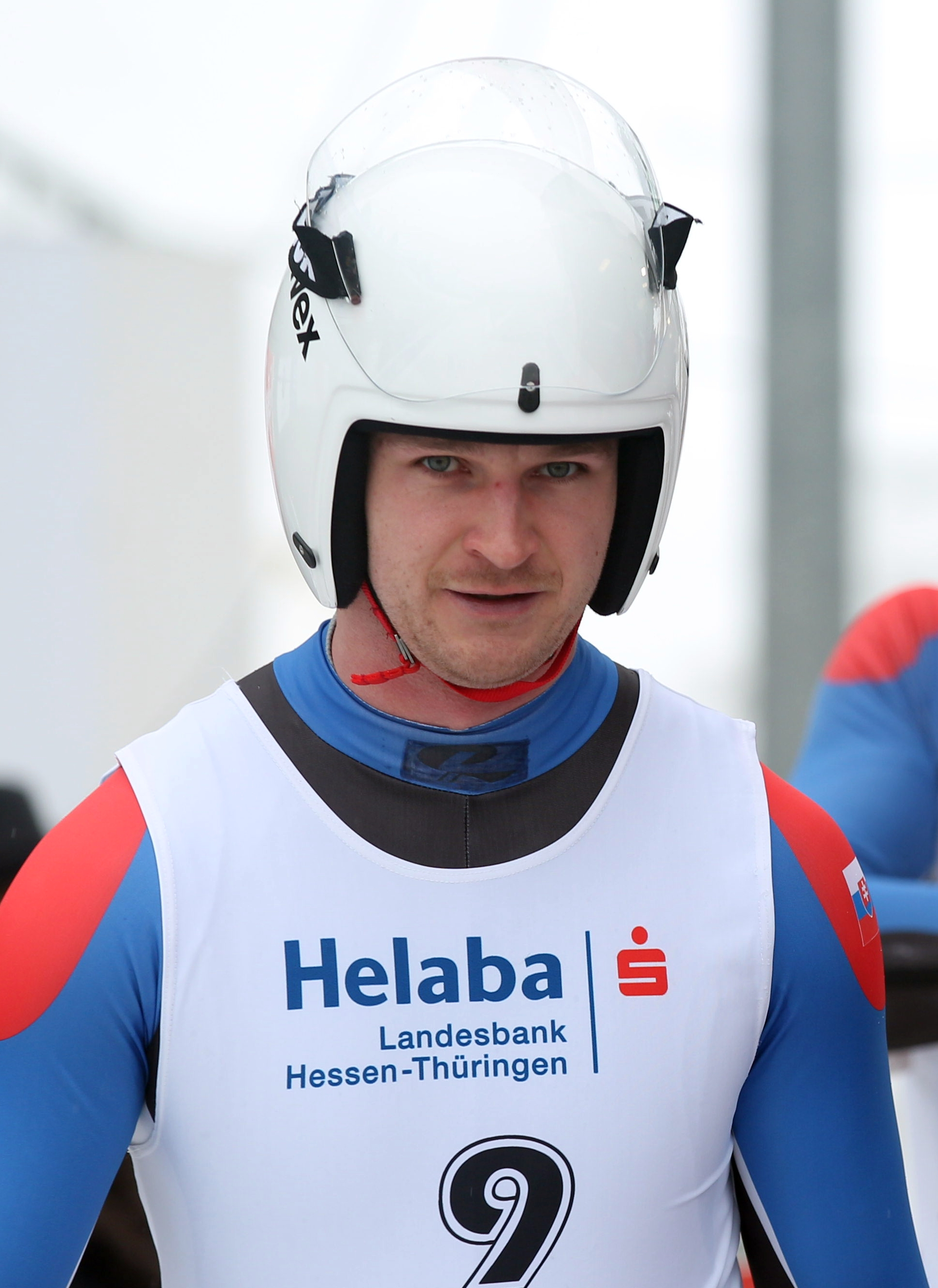 Karol Stuchlak beim HELABA Nationscup der Doppelsitzer in Oberhof 2017